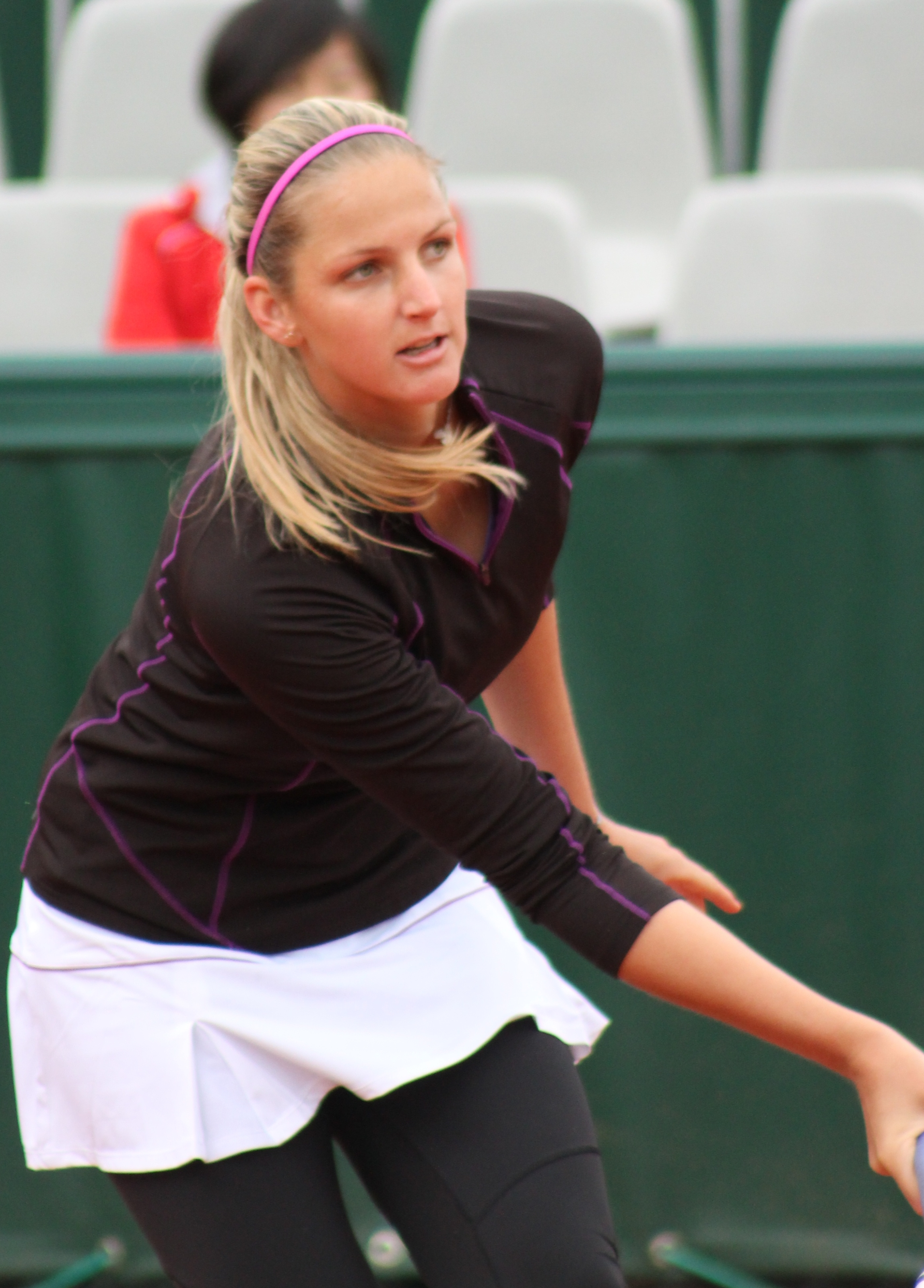 Pliskova Karolina RG13 (8)